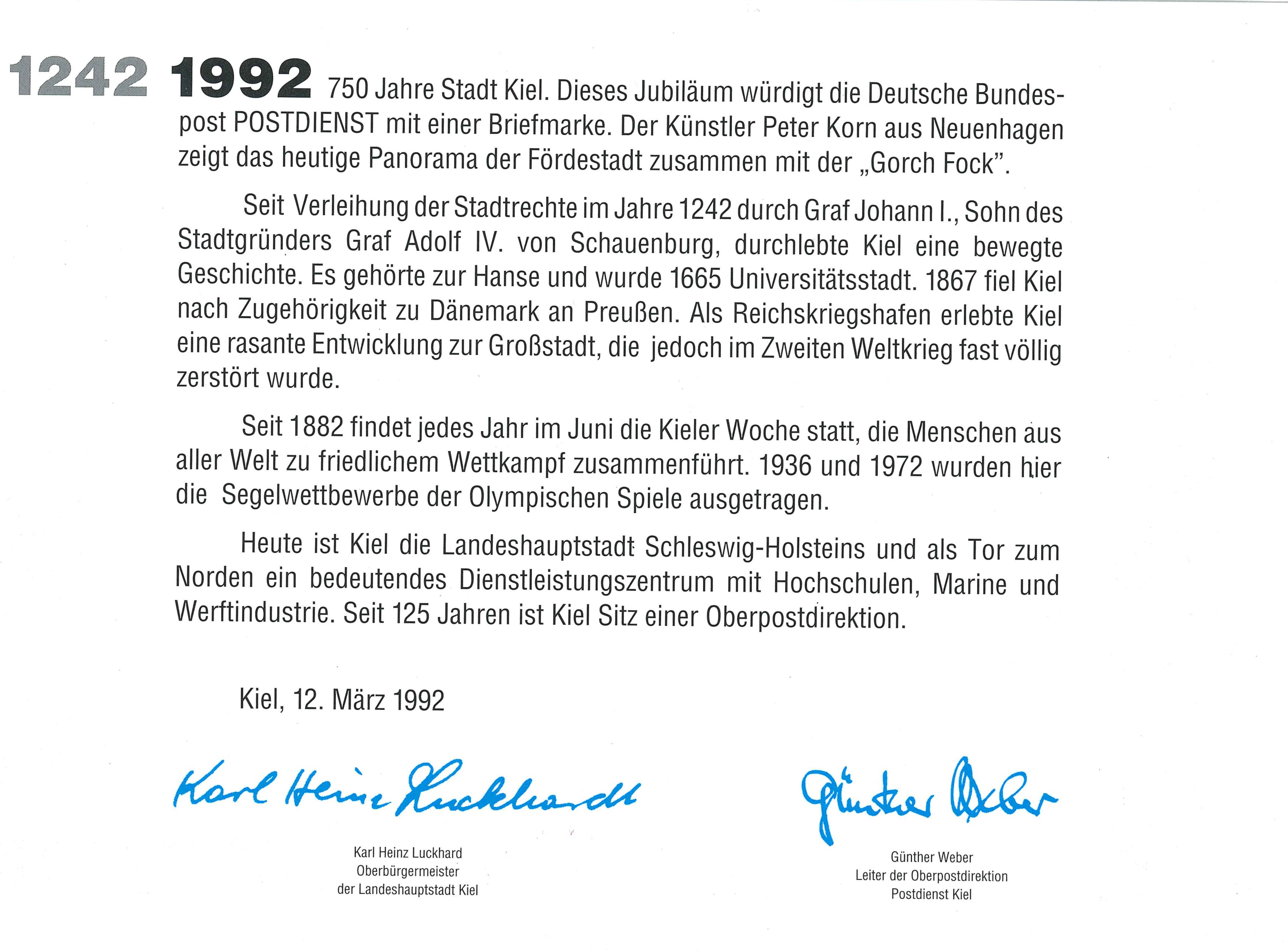 Ersttagsblatt 750 Jahre Kiel